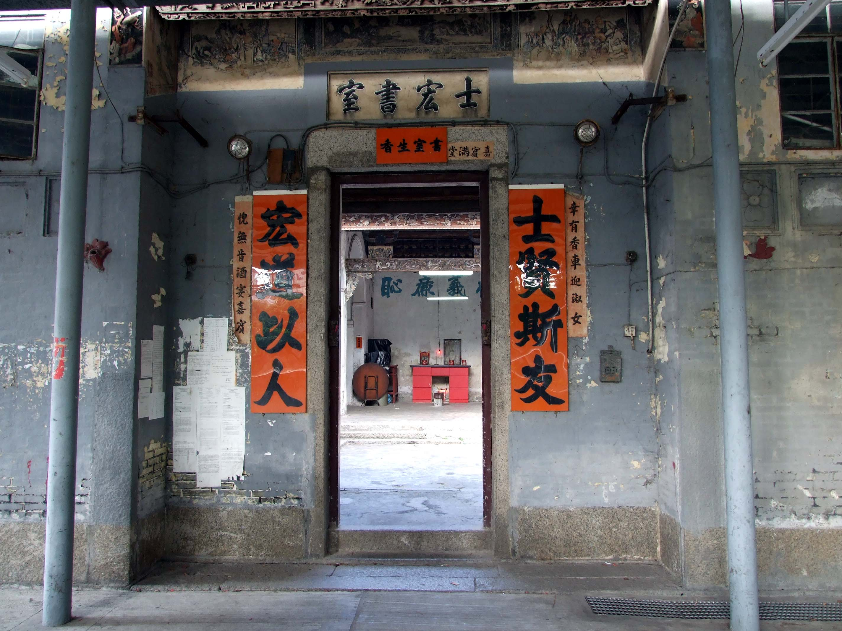 中文（香港）: 廈村新圍士宏書室